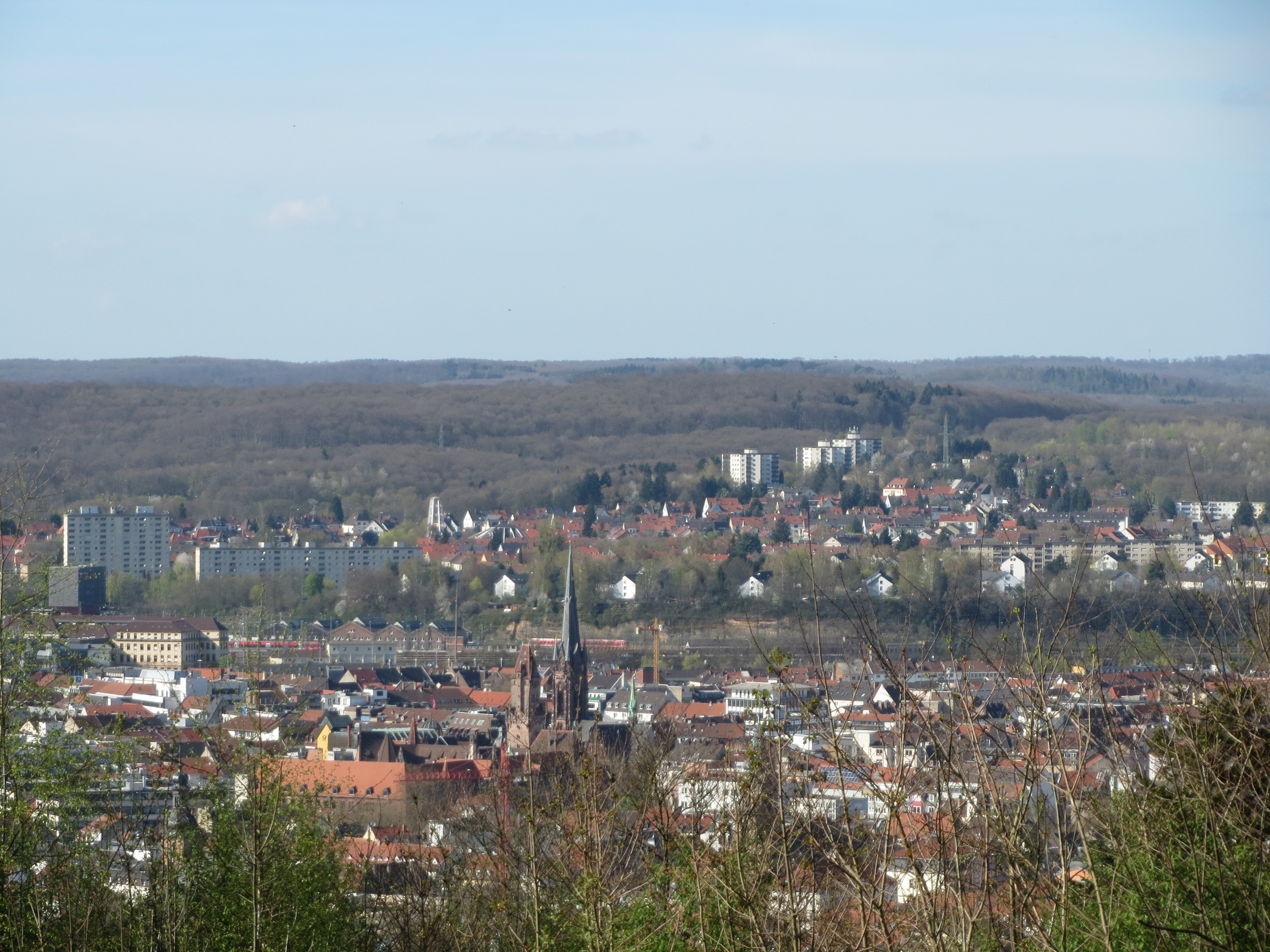 Blick vom Winterberg über Sankt Johann und den Rodenhof (Saarbrücken)